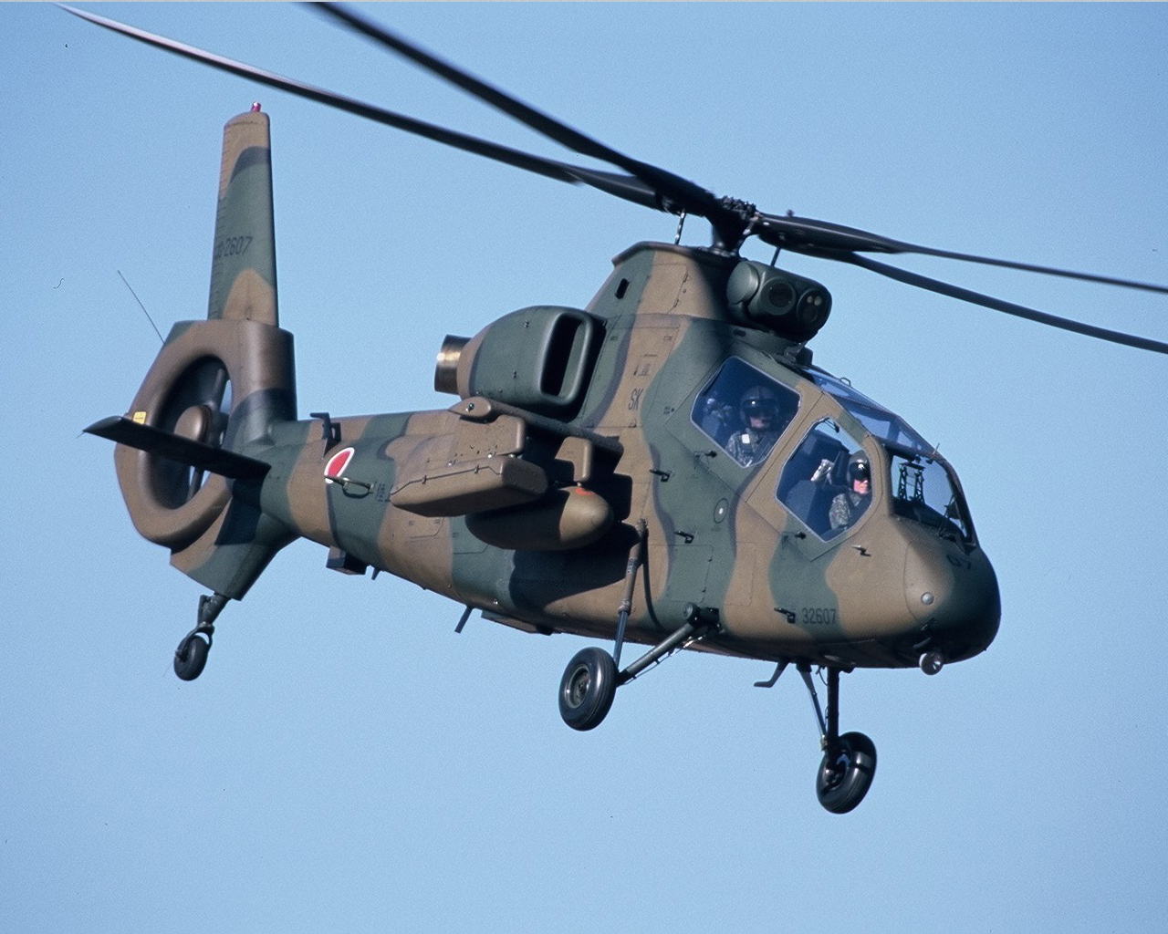 略称：OH-1 愛称：ニンジャ [乗員]2人 ○機体 [全長]13.40m [全幅] 11.60m（AAMランチャー幅3.30m） [全高]3.80m [製作]川崎重工業 ○エンジン [名称]TSI-M-10 [出力]777SHP×2 [製作]三菱重工業 [最大全備重量]約4,000kg [最大速度]約280km/h [巡航速度]約240km/h [航続距離]約550km [実用上昇限度]約4,880m 陸上自衛隊の観測ヘリコプターOH-6Dの後継機。純国産機として平成4年から開発に着手、8年8月、初飛行試験に成功した。メーンローターにヒンジ レス（無関節）型ローターシステムを採用、操縦応答性の向上を図っているほか、グラスファイバー複合材を使ったローターブレード、座席の装甲化・防弾 ガラス、二重の油圧・操縦系統などで生存性を高めている。タンデム型（縦列）座席で機体本体の幅は1mしかないため、レーダー反射面積が小さく、目視 発見率も低い。ダクト内テールローターはブレード不等間隔で配列、騒音を抑え安全性を高めている。後部座席の後方上に赤外線センサー、可視カラーTV 、レーザー測距装置を一体化した索敵サイトを搭載、敵地上部隊の状況を昼夜を問わず探知、識知できる。コックピットには任務適合成の高いアピオニクス 統合システムを採用している。AAM×4で武装する。